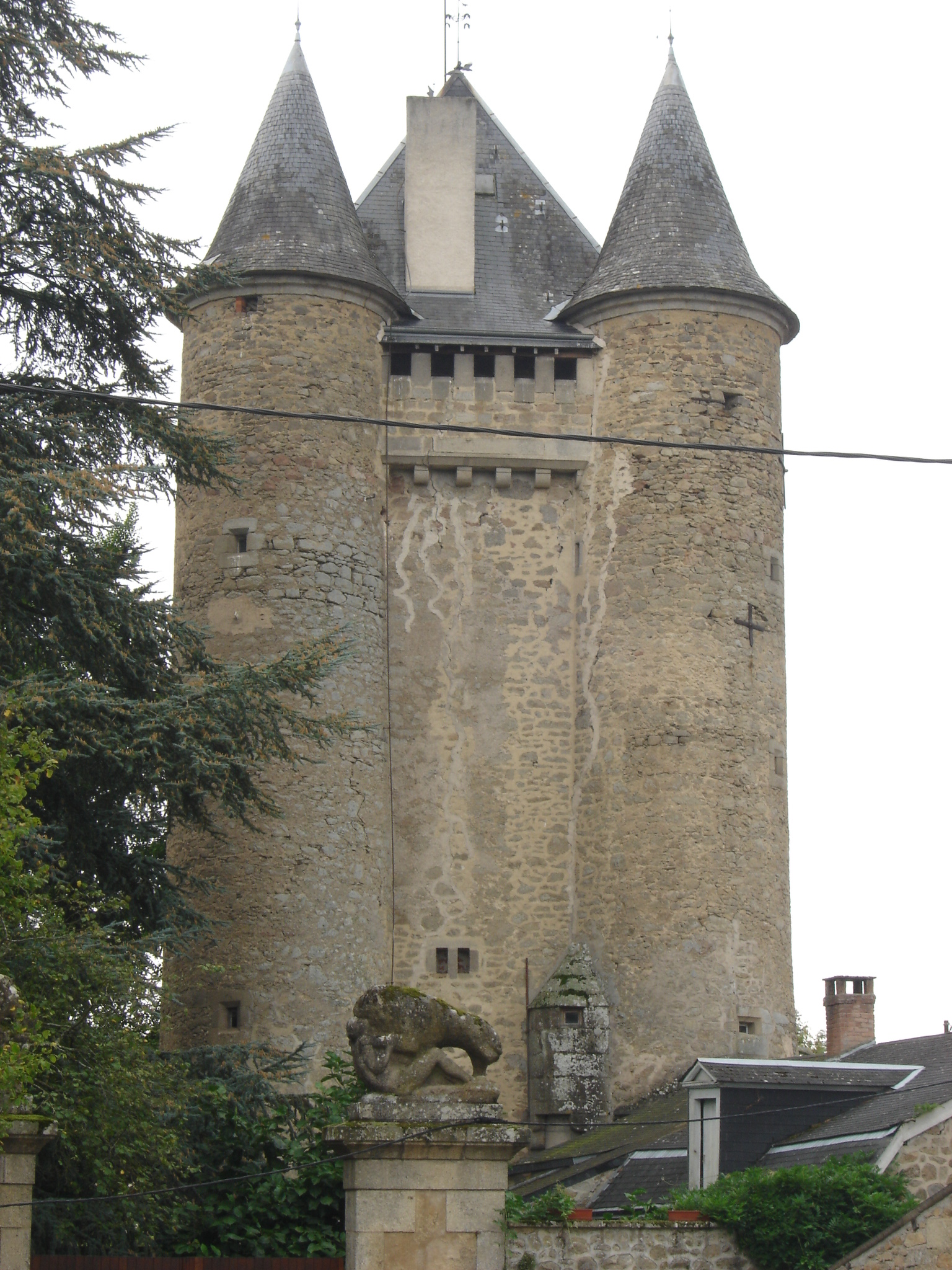 Château de Jouillat dans la Creuse (France). Photo personnelle.